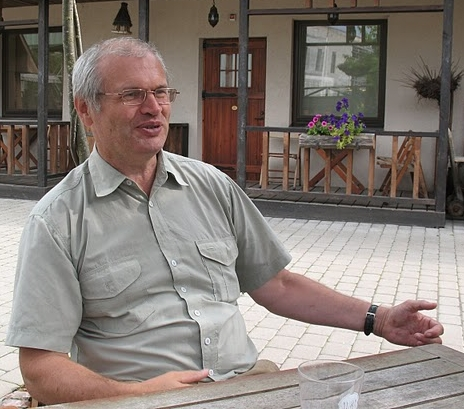 Jüri Ginter Tartus